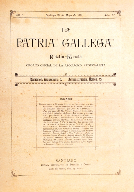 La Patria Gallega, Santiago de Compostela, do 30/5/1891, dedicado a Rosalía con motivo do traslado dos seus restos do Cemiterio de Adina ao Panteón de Galegos Ilustres.